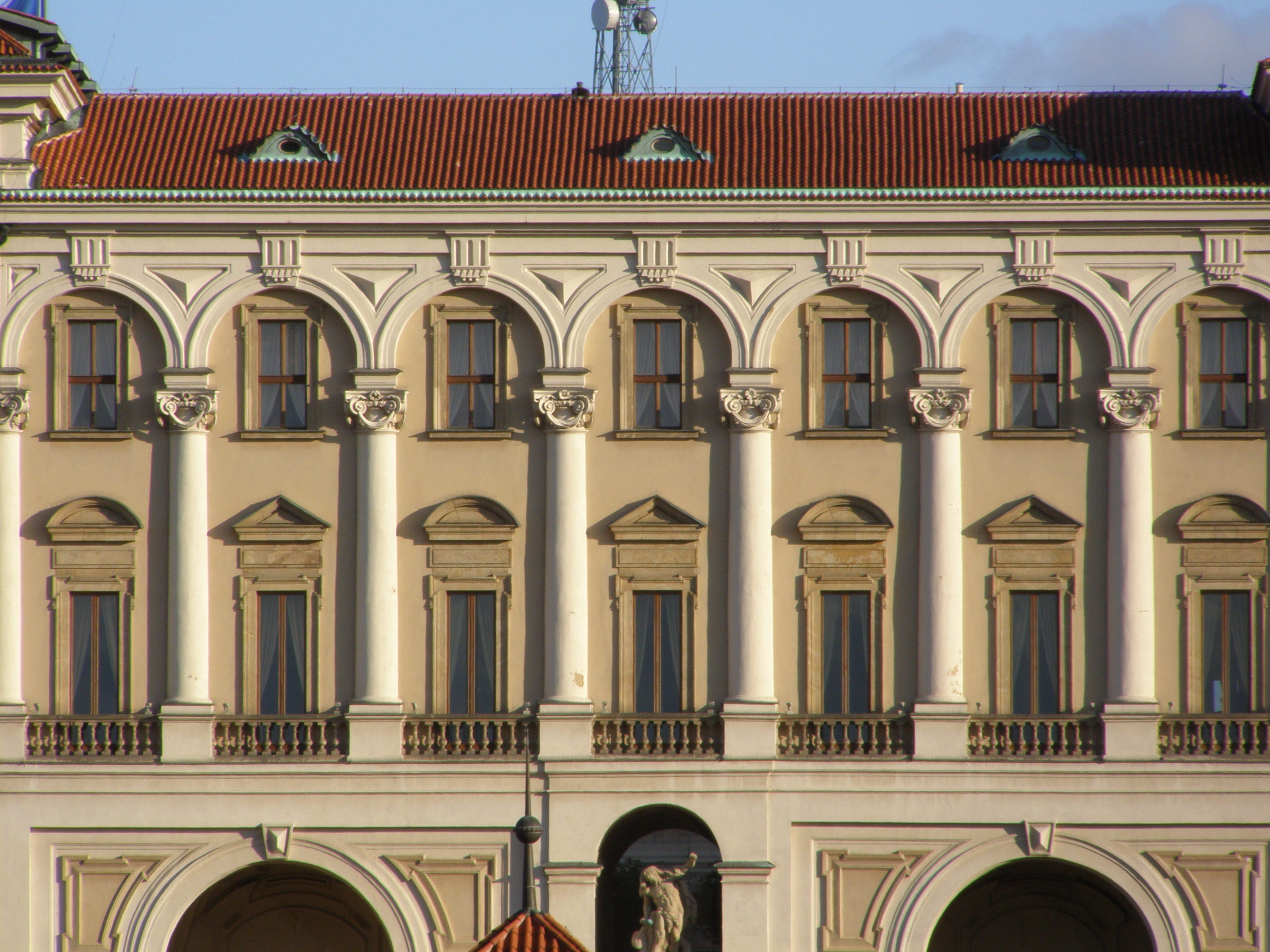 Praha, Hradčany,Černínský palác, pohled od severu